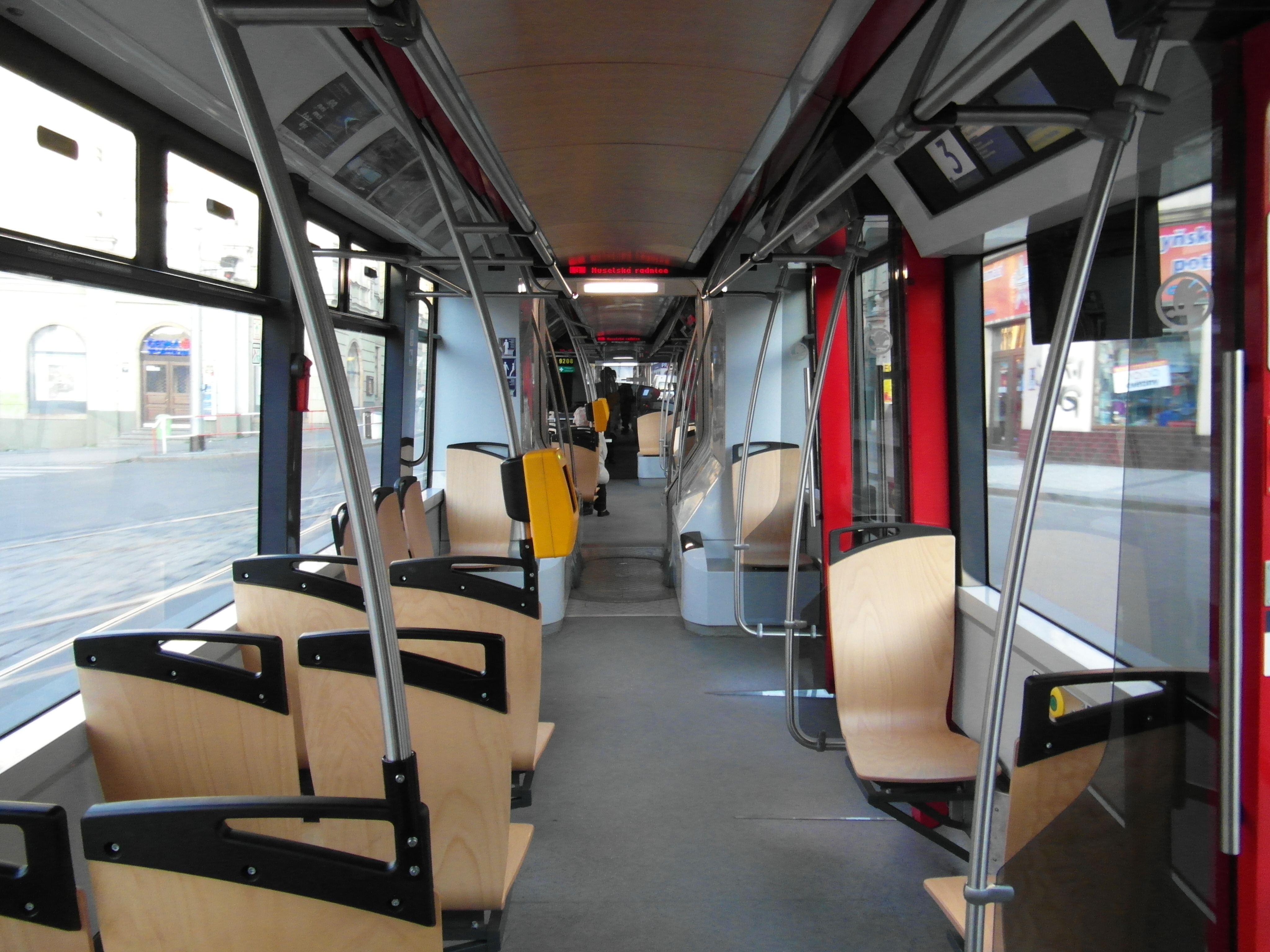 Praha - Inside Tram - Škoda 15T For City